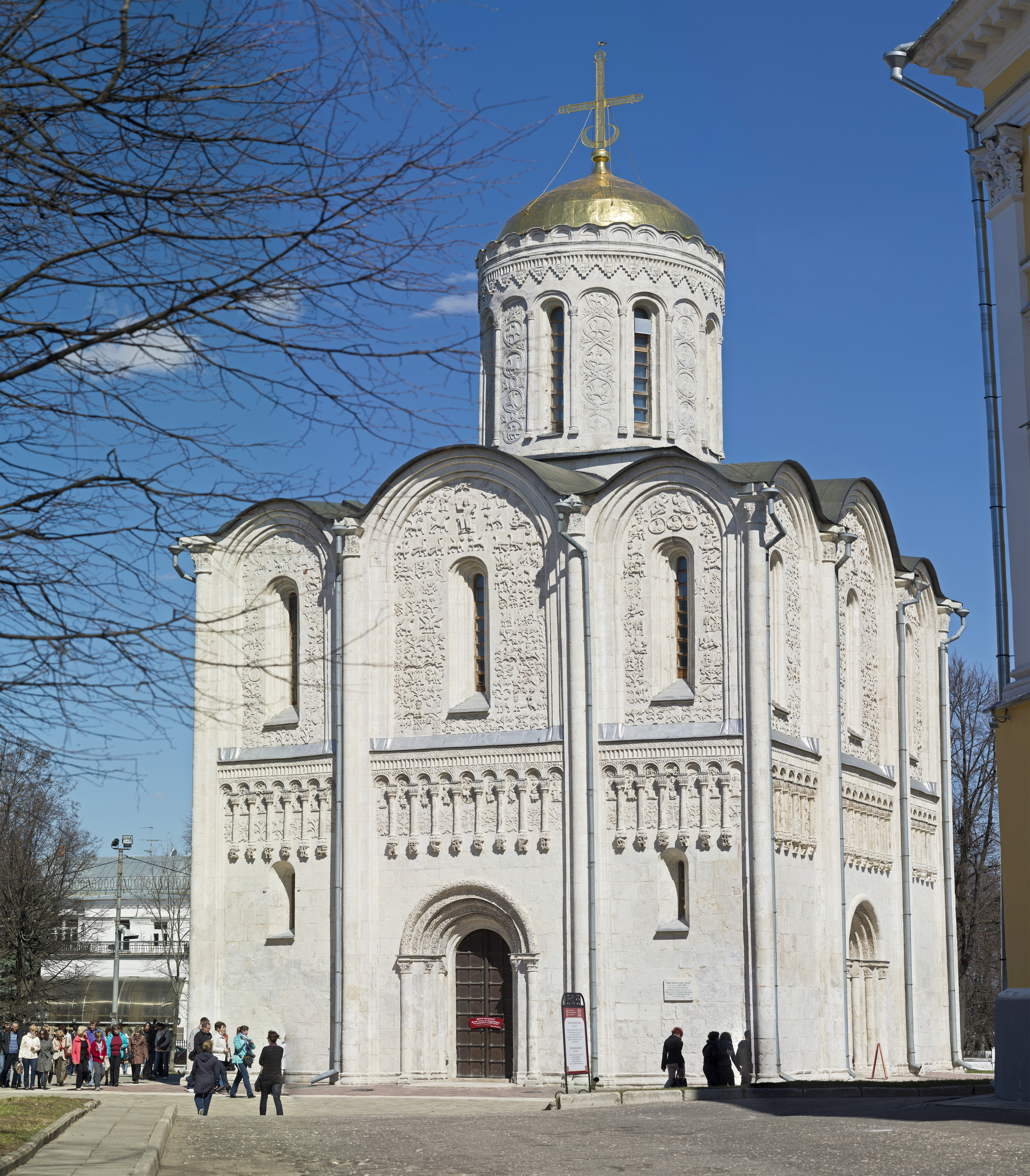 Собор Дмитриевский (Владимирская область, Владимир, Большая Московская улица, 60)